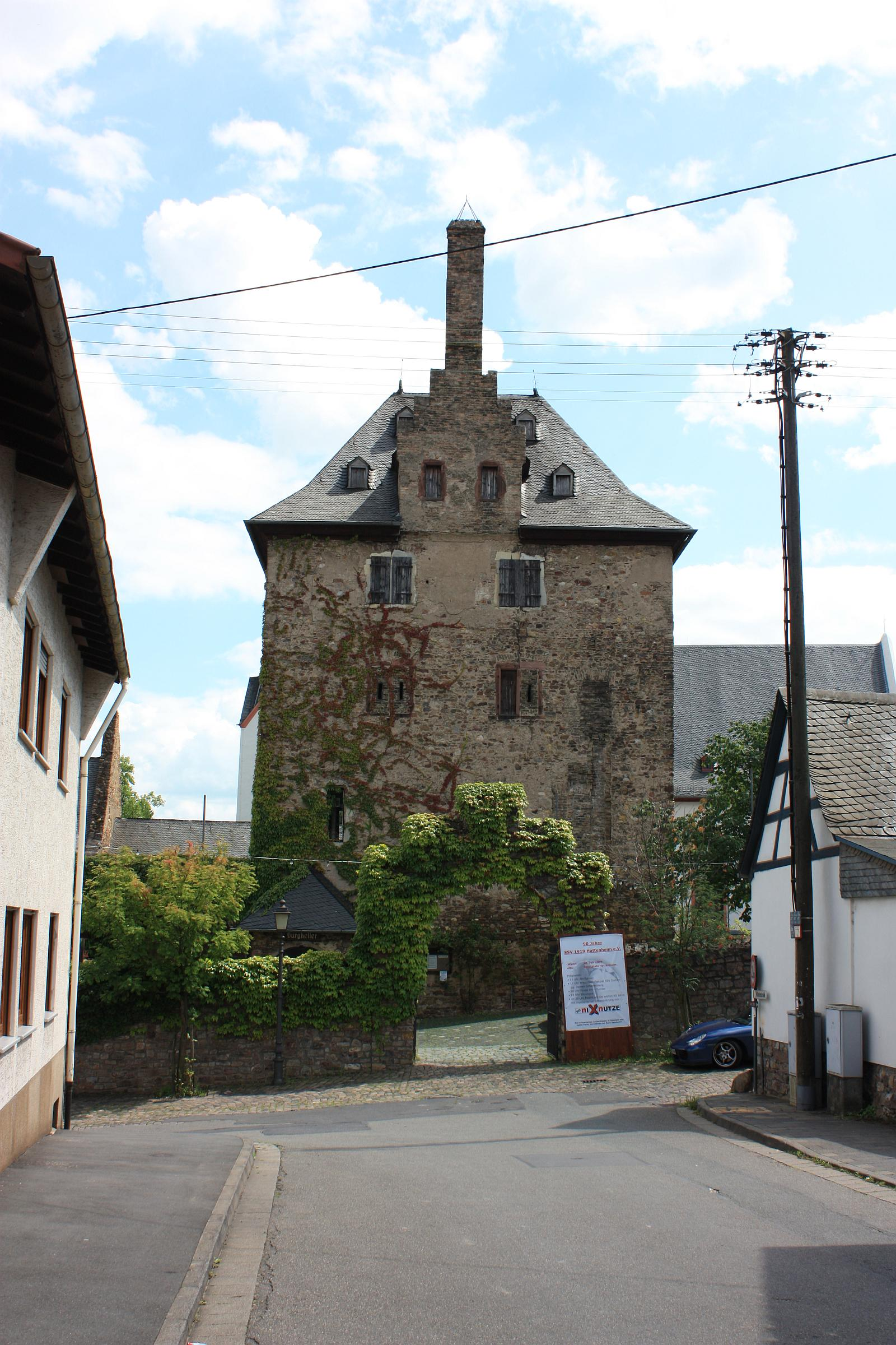 Burg Hattenheim